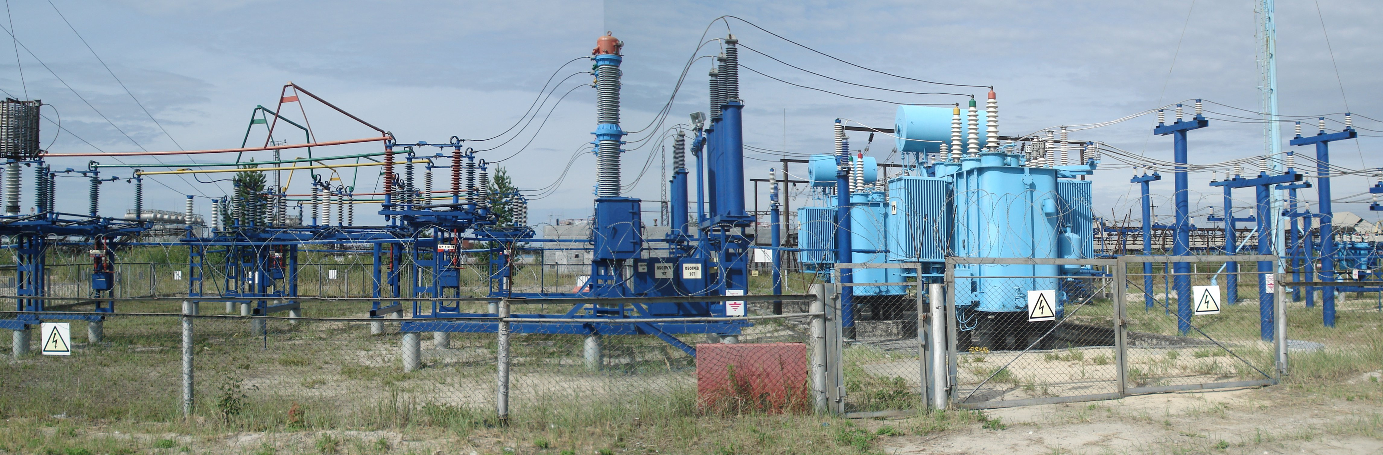 ОРУ 110 кВ, жесткая ошиновка, ПС 110/35/6 кВ "Лянтор".